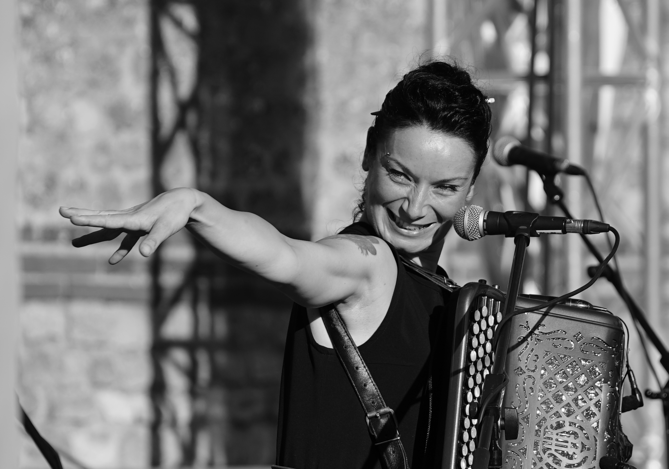 en concert à Reims.